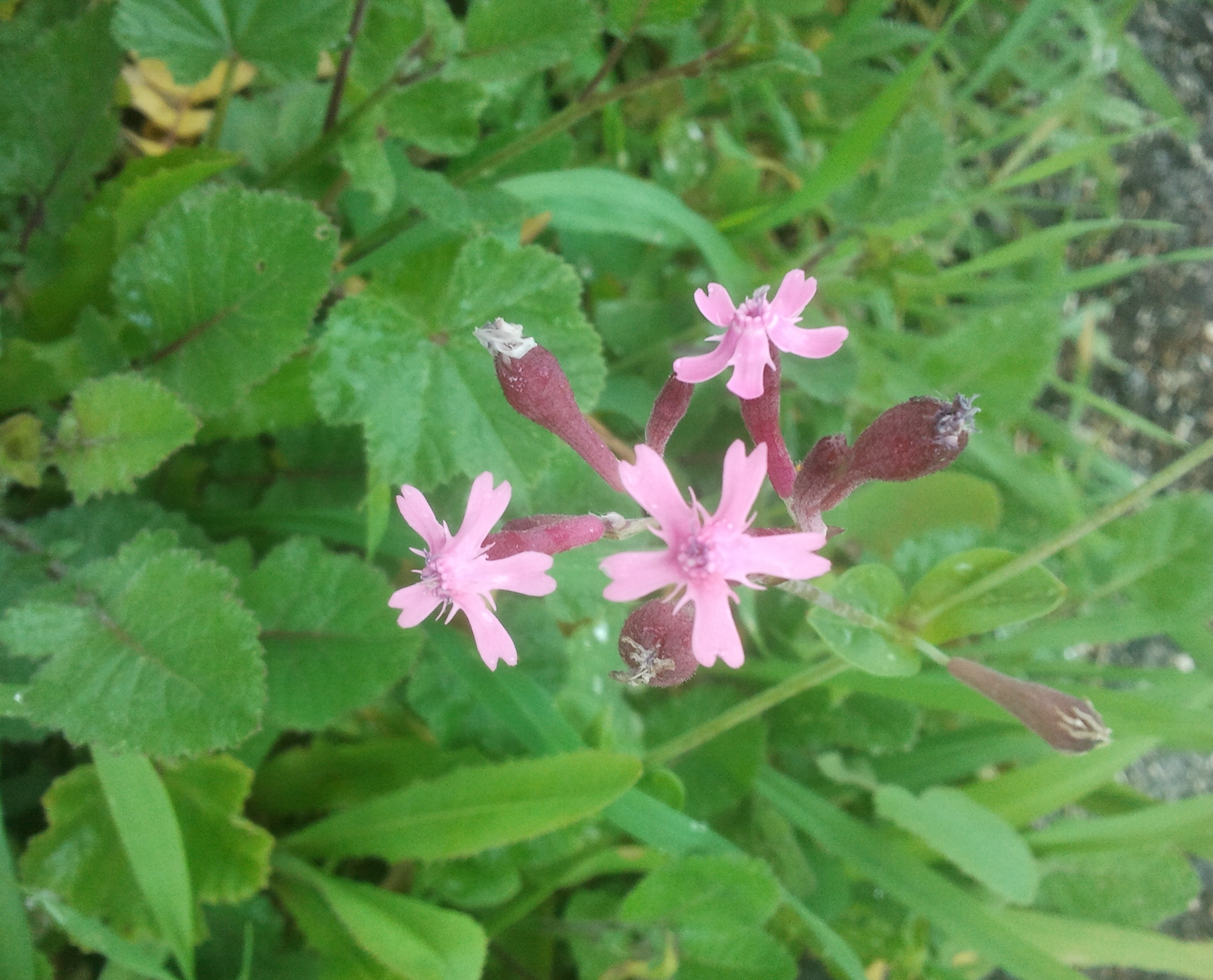 צפורנית מצרית הוא צמח עשבוני חד-שנתי ממשפחת הצפורניים.